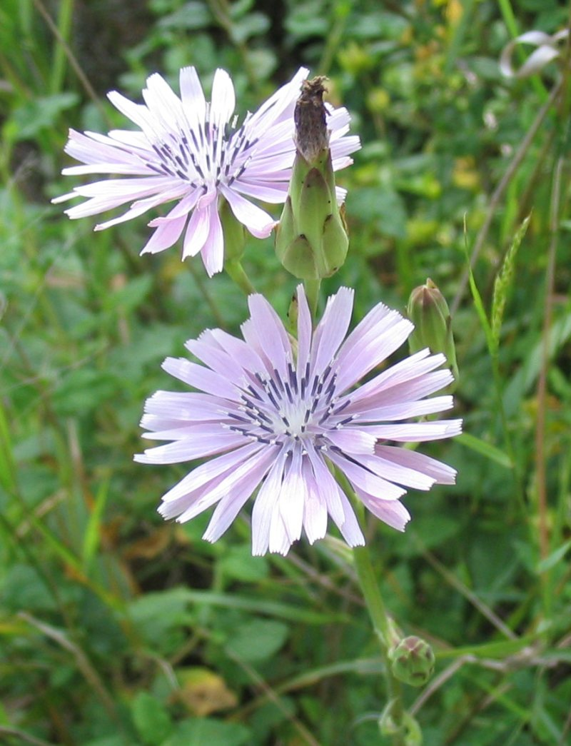 Lactuca tuberosa, Mount Carmel, Israel, May 1, 2004.